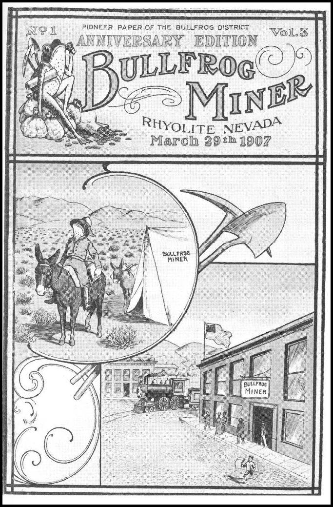 Bullfrog Miner newspaper From Rhyolite, Nevada 1907